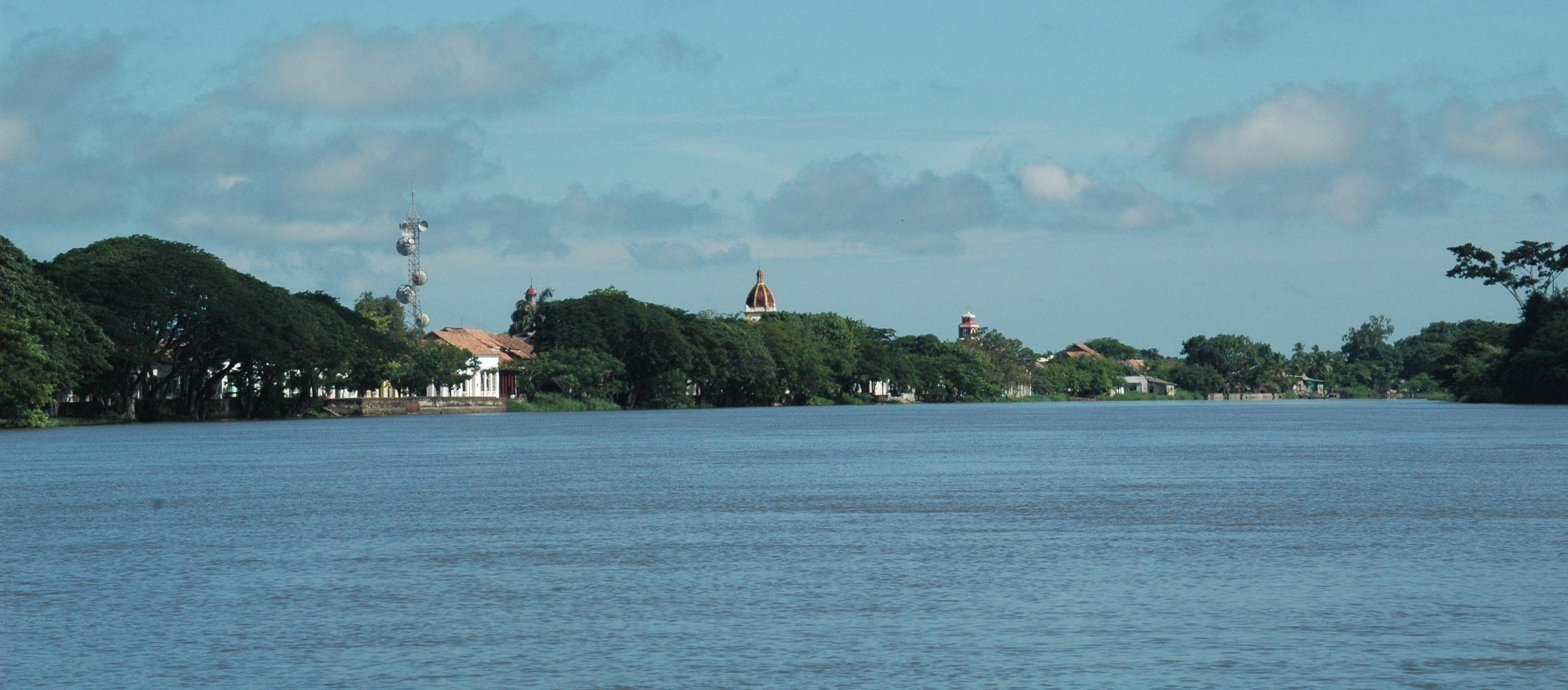 Santa Cruz de Mompox Vista delle Albarradas dal Rio Magdalena